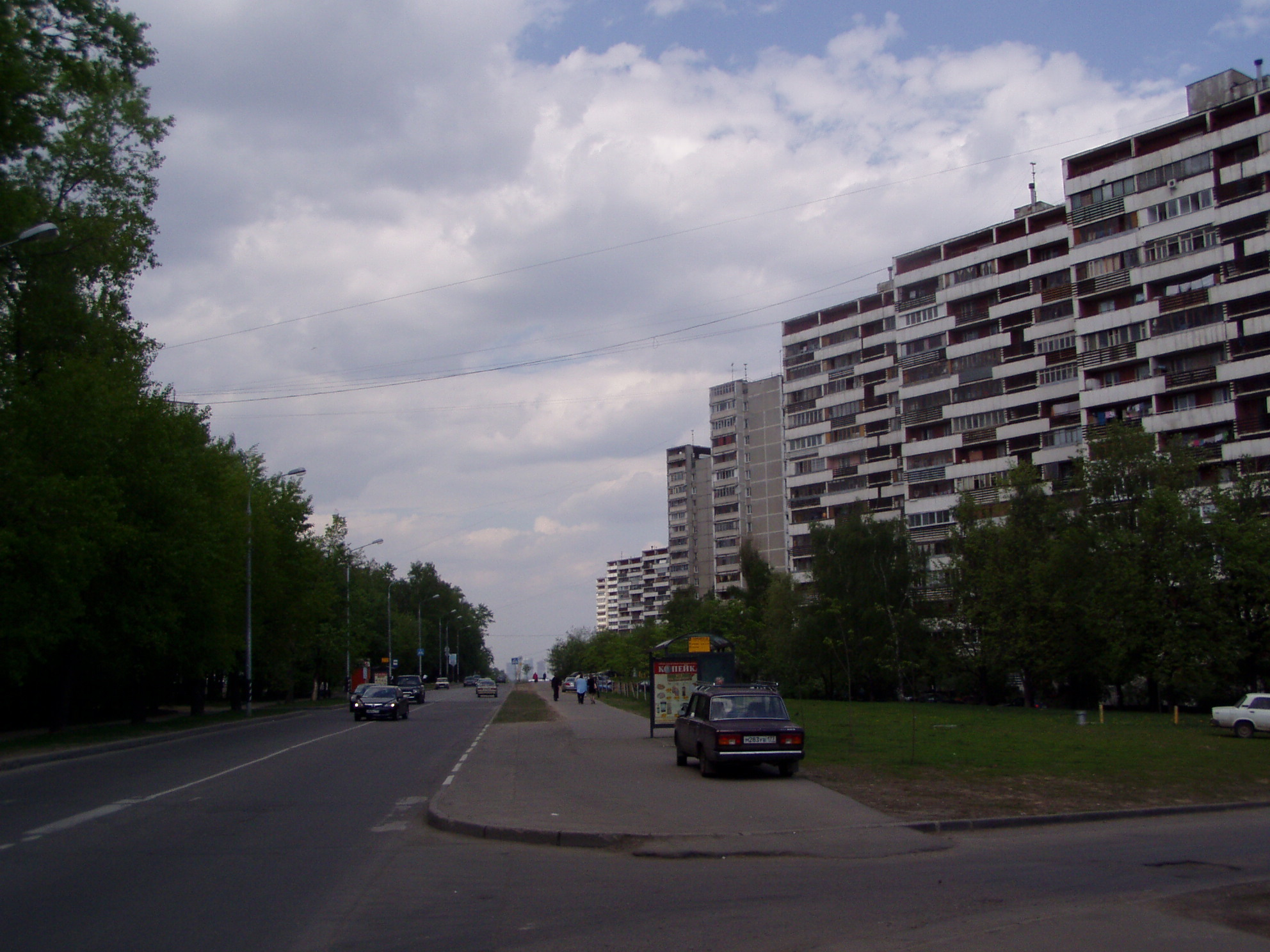 Вид на Озёрную улицу в Москве.